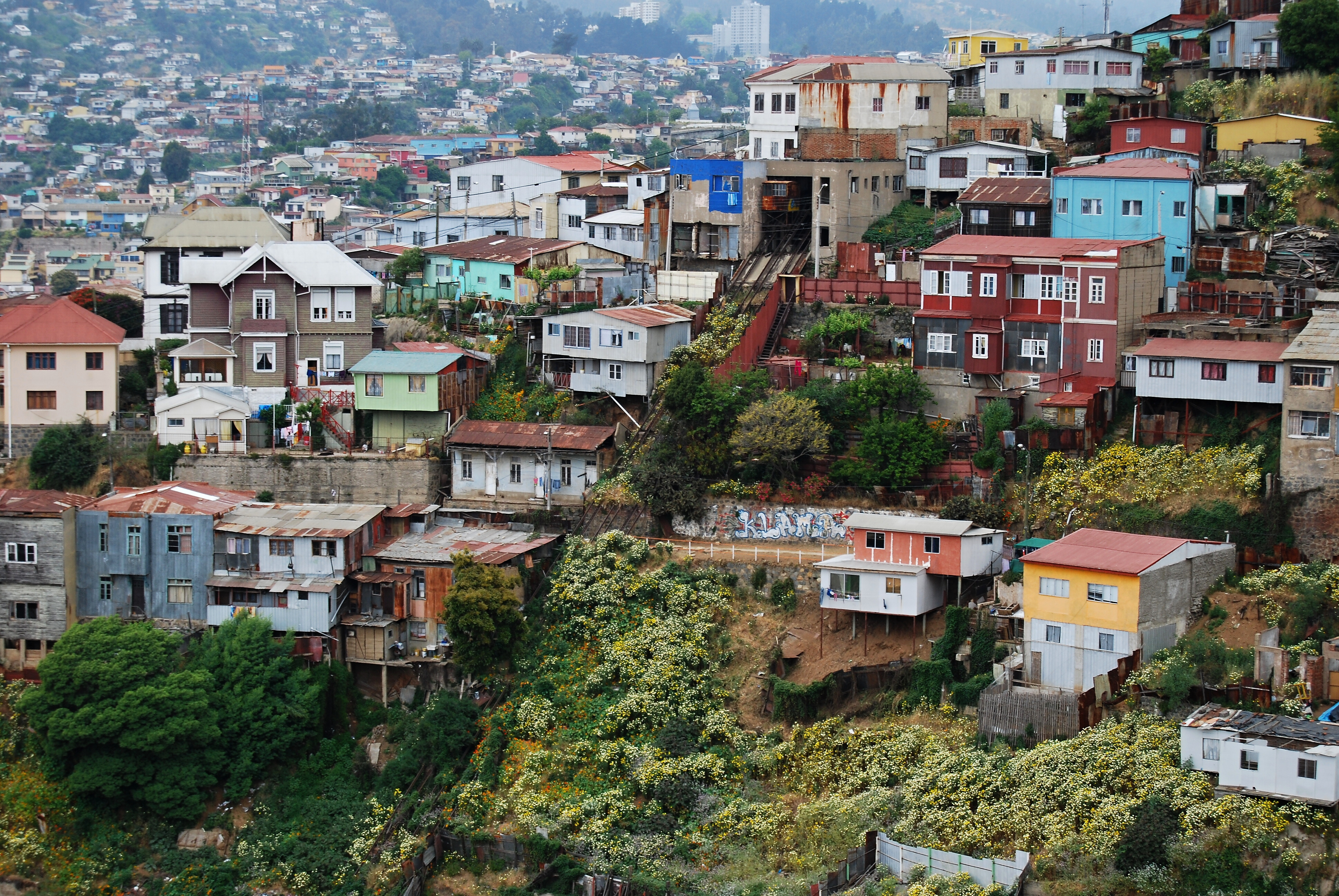 Valparaiso